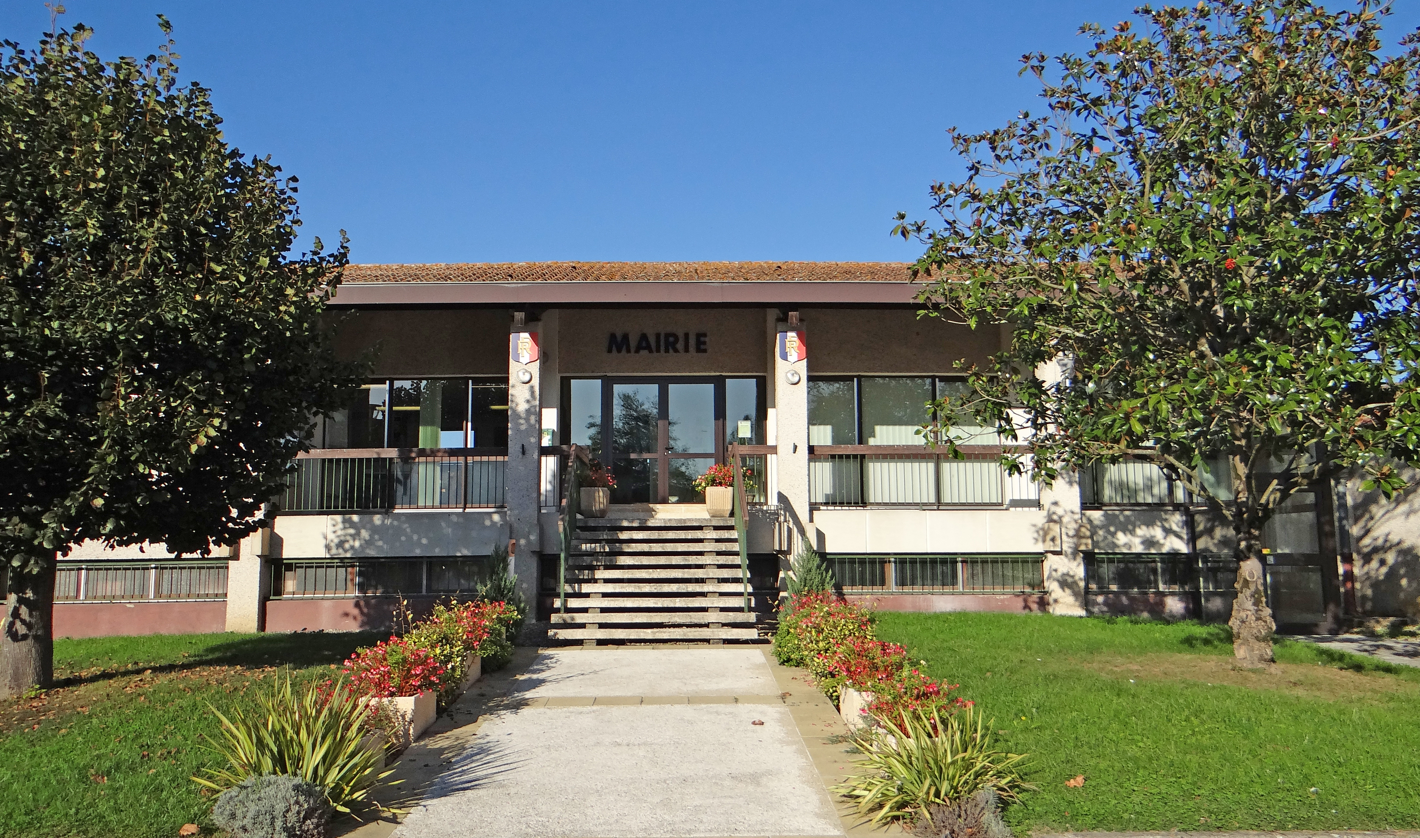 Saint-Hilaire-de-Lusignan - Mairie